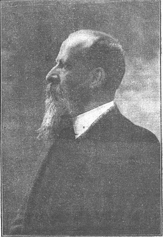 Fotografia de Louis Queyrat dins una revista medicala de 1931